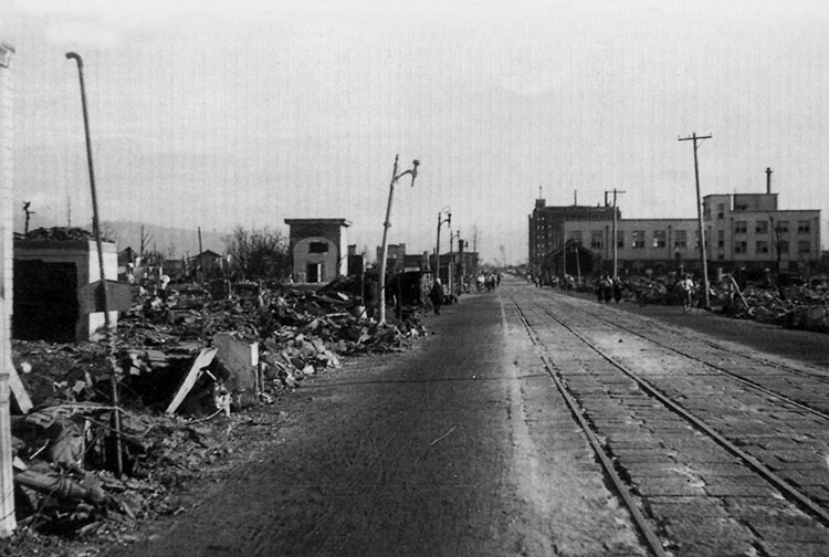 1945年（昭和20年）8月の富山大空襲により焦土と化した富山市（富山地方鉄道株式会社企画室編、『30年のあゆみ』、1960年（昭和35年）10月1日、富山地方鉄道株式会社）